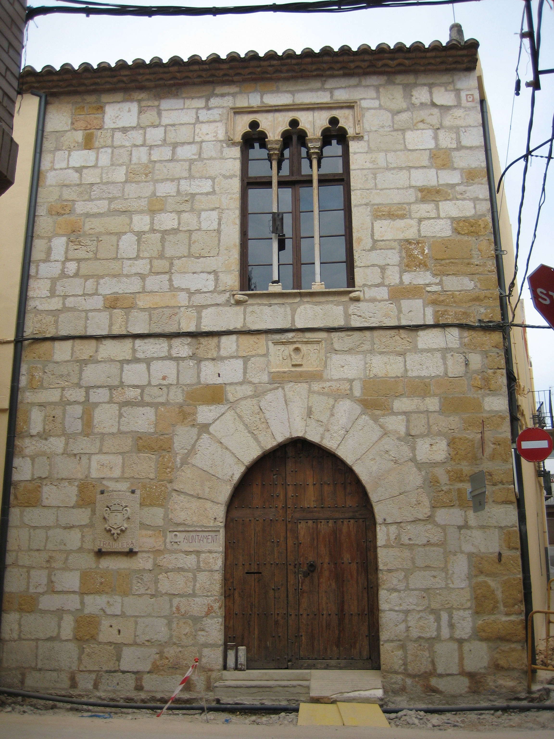 Ajuntament de Traiguera (Baix Maestrat)